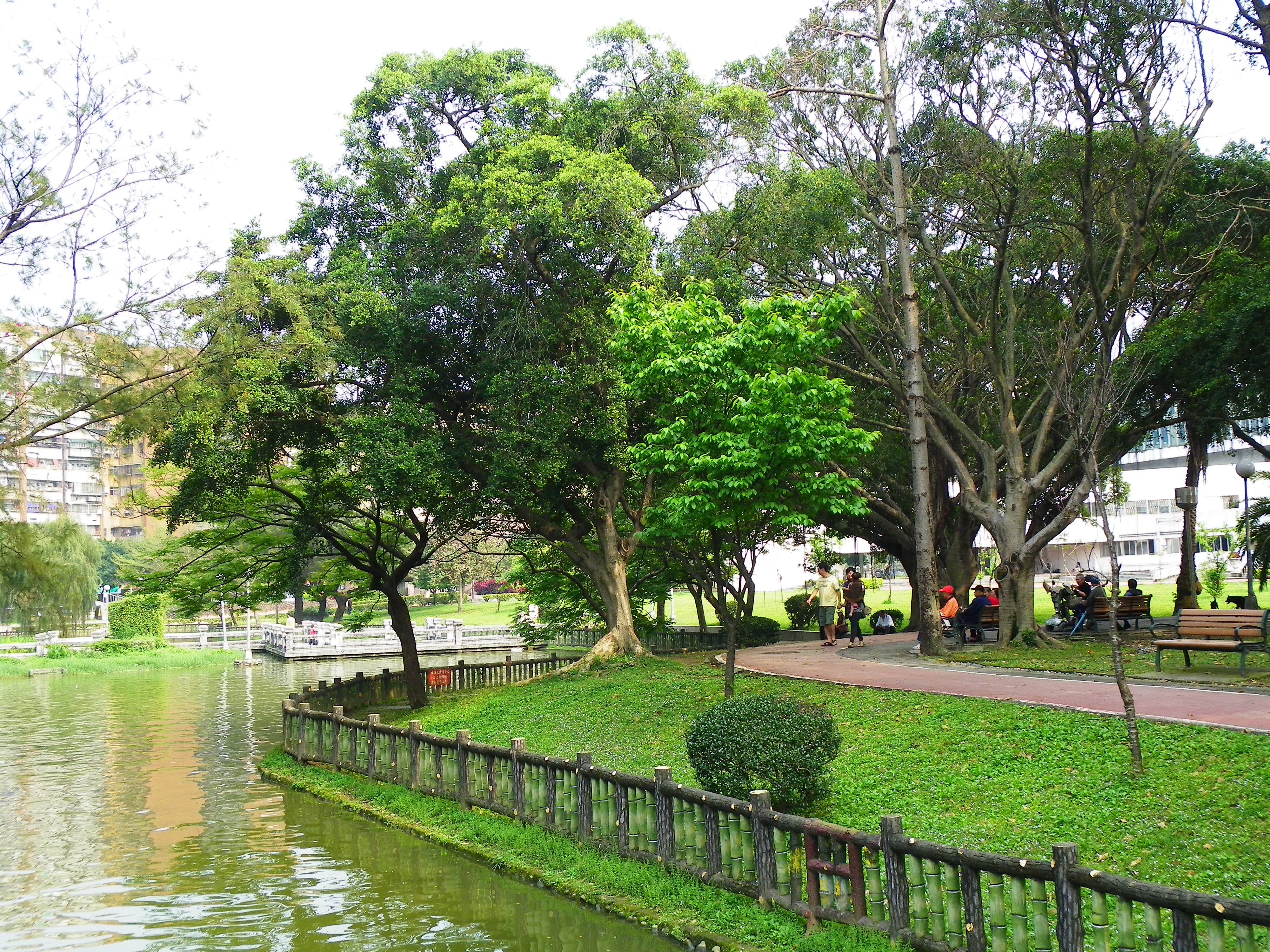 臺北市青年公園的蓮花池西半部與九曲橋。